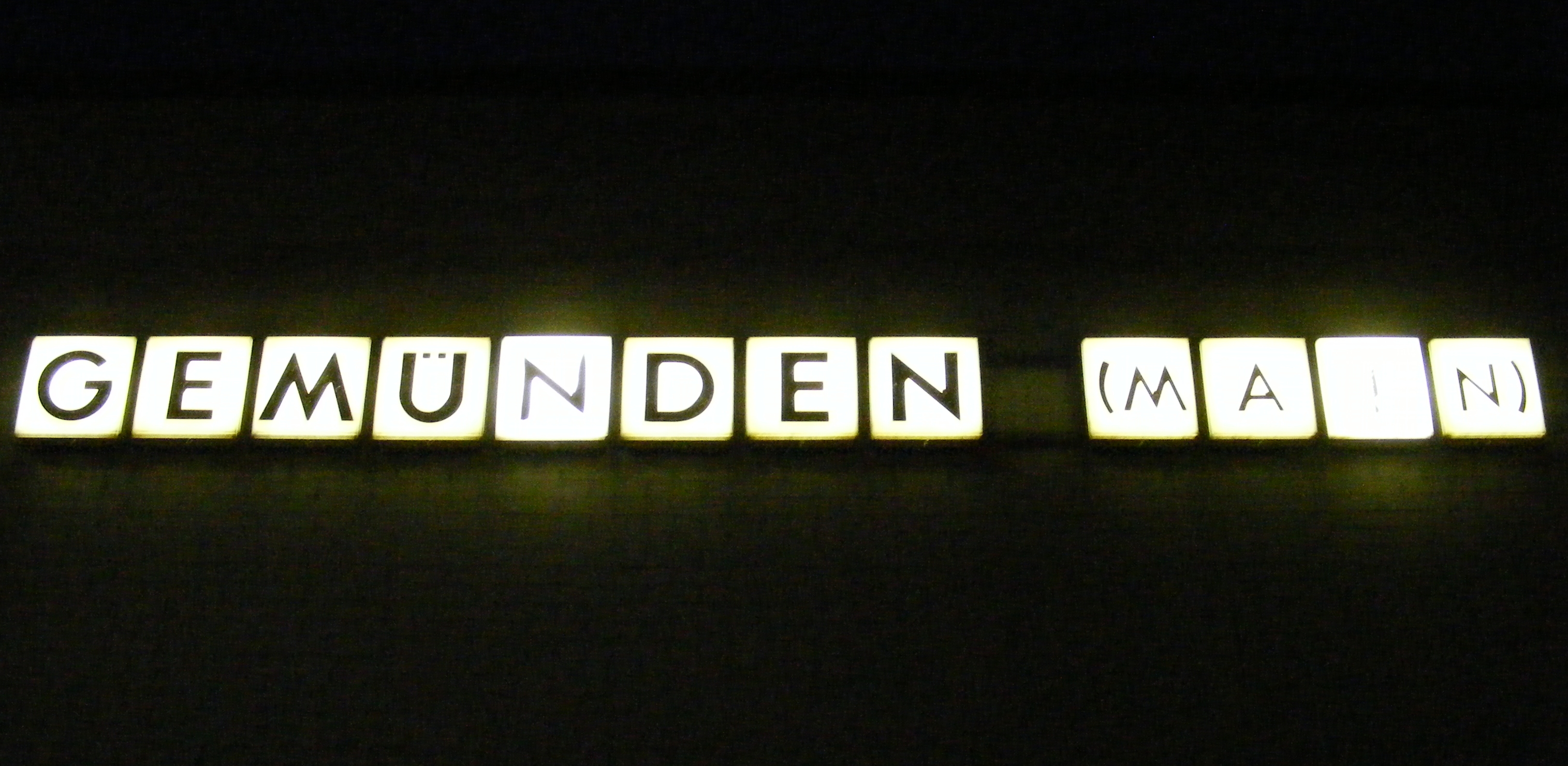 Schriftzug GEMÜNDEN (MAIN) am Stellwerk bei Dunkelheit (beleuchtet)